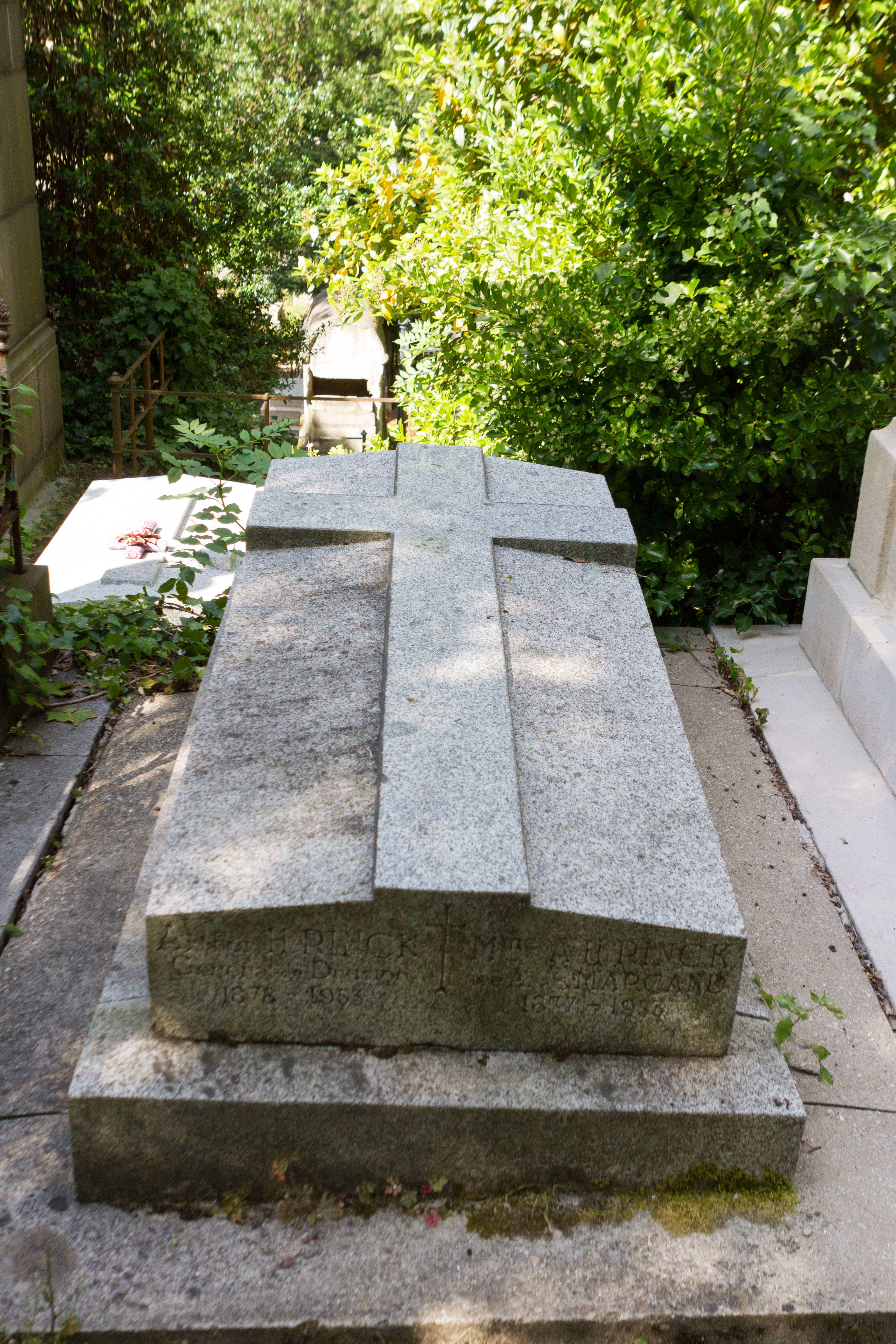 Sépulture d'Henrich-Camille-Constant-Arthur Rinck (1878-1953), général de division.